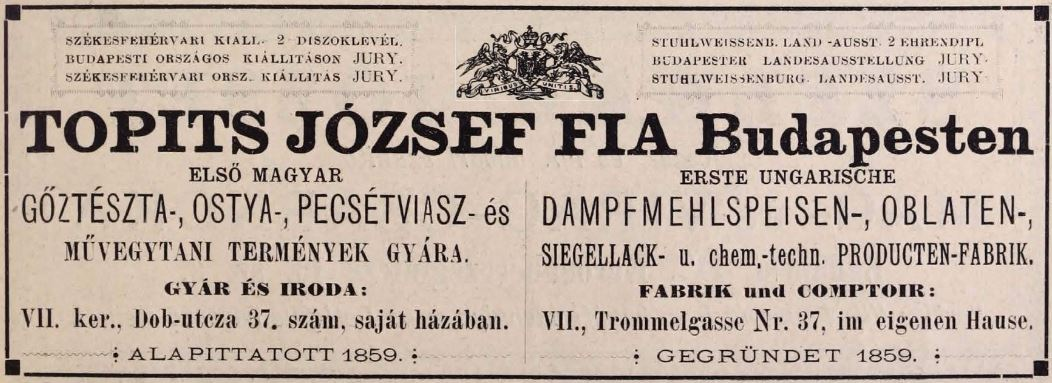 Topits József fia – Első magyar gőztésztagyár hirdetése (középen Ferenc József címere látható)